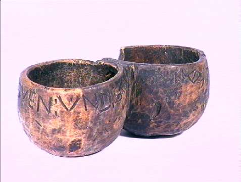 Tvillingbolle datert 1738 fra Valle i Aust-Agder, lengde 12,2 cm. Norsk Folkemuseum NF.1927-1279. Foto Anne-Lise Reinsfelt.